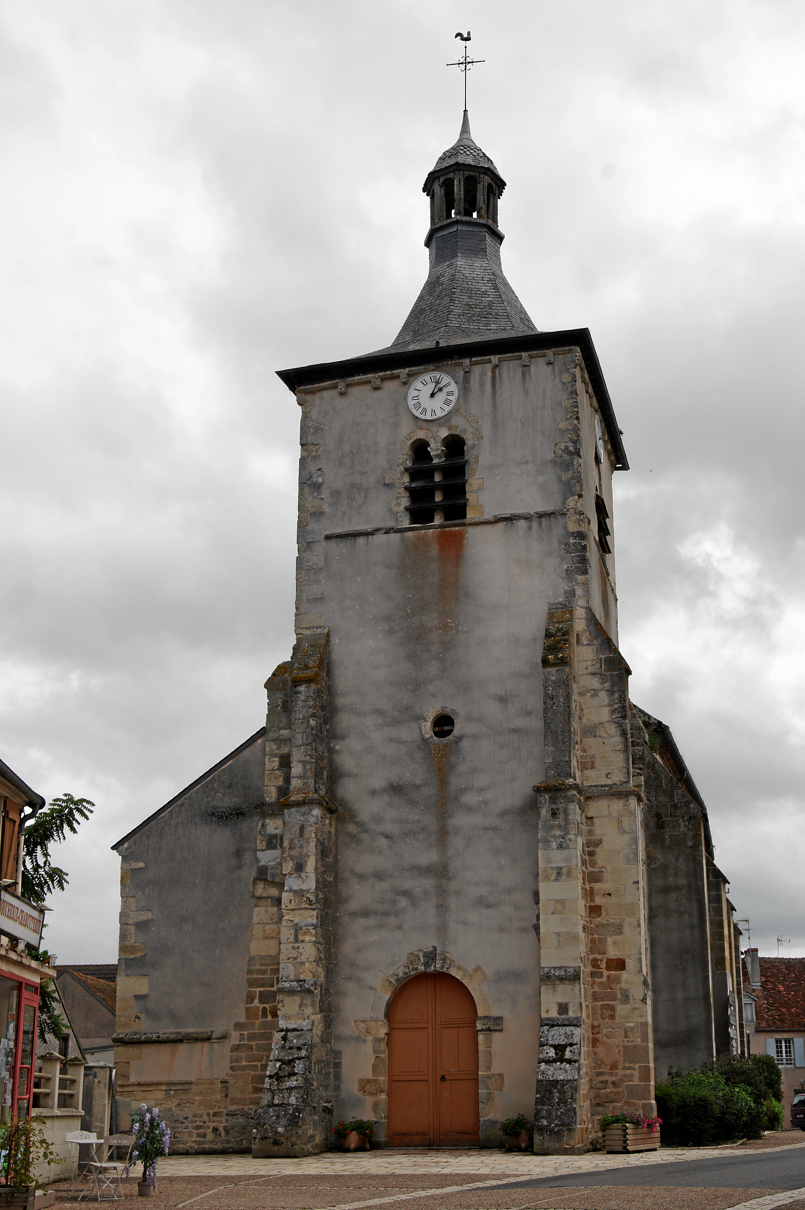 Église Saint-Hippolyte in Le Veurdre